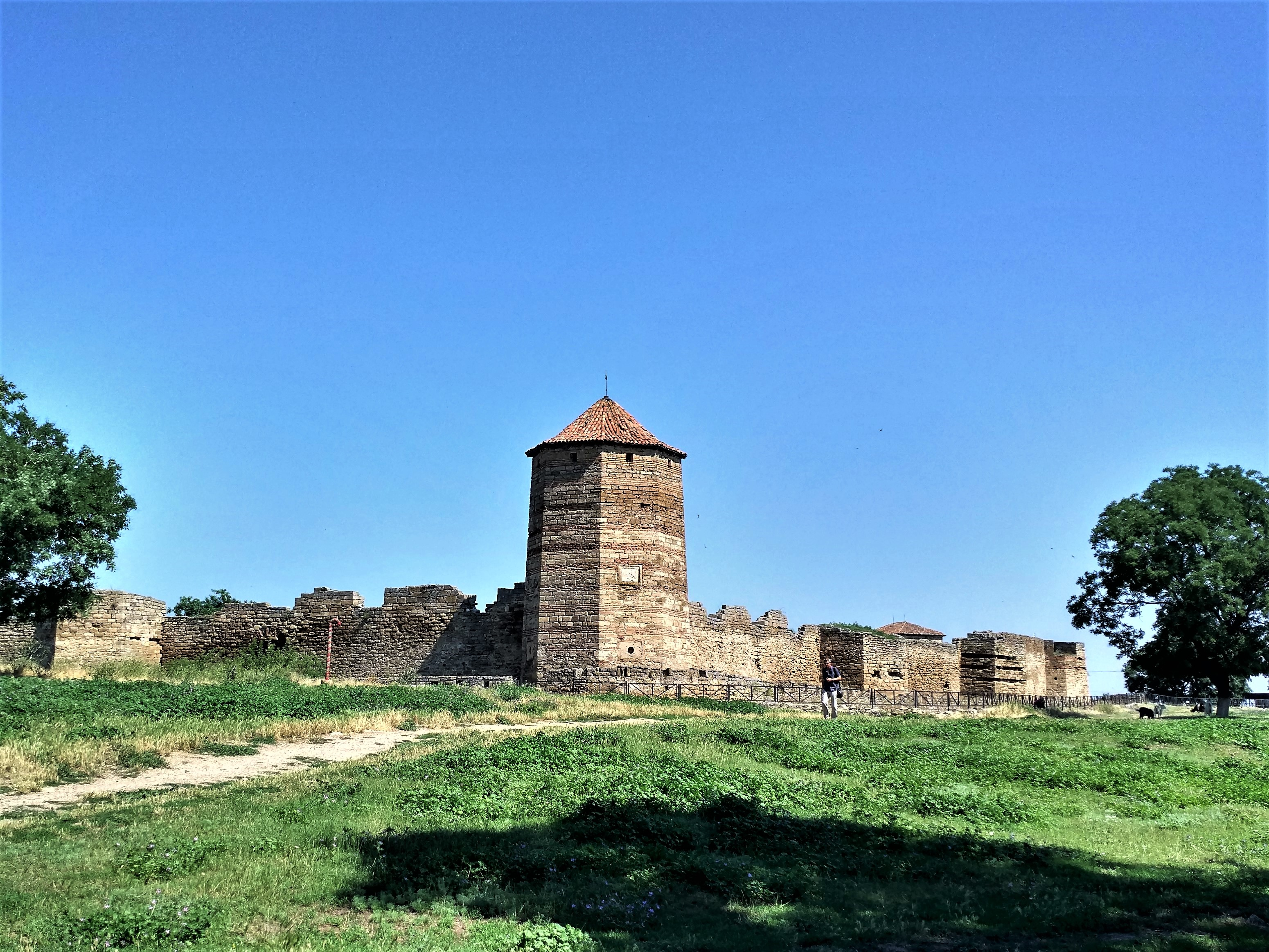 Брама, башти, мури, Білгород-Дністровський, вул. Адмірала Ушакова